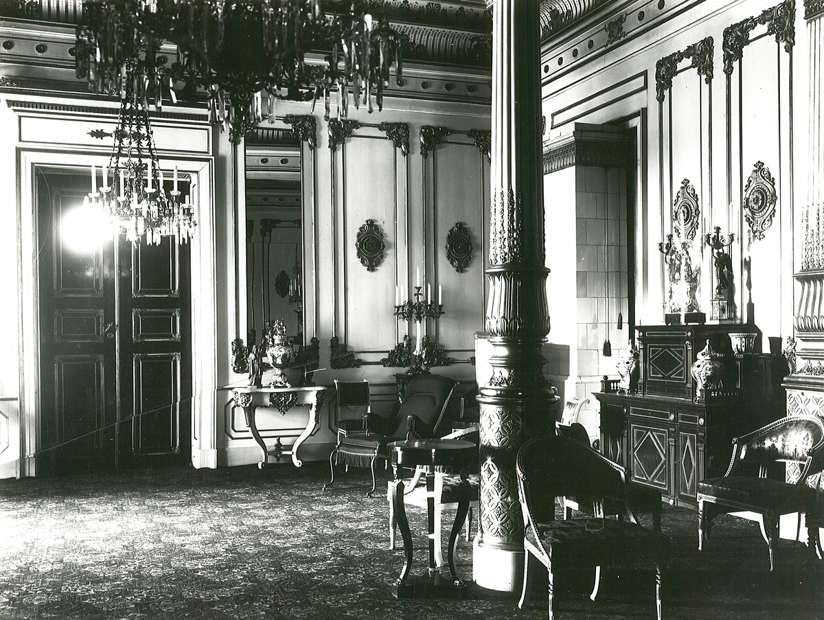 Interiør fra Det kongelige slott i Oslo, 1898